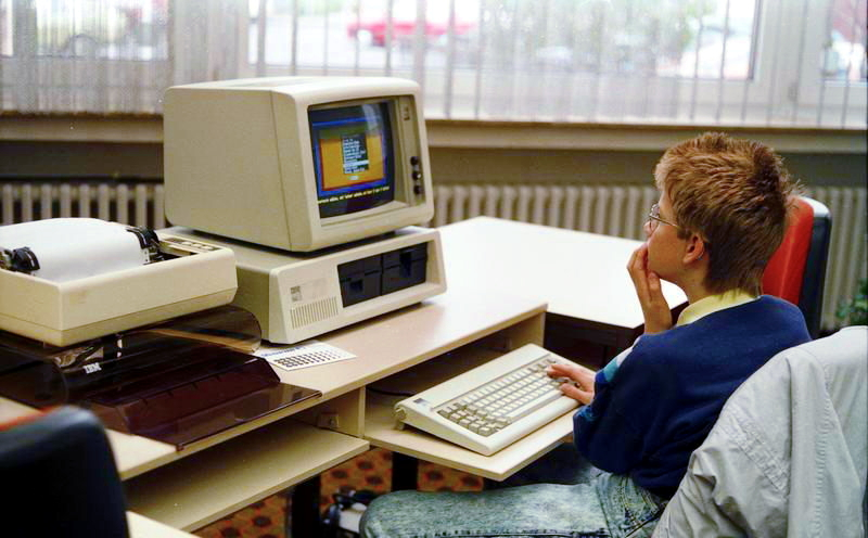 April 1988 Jugend am Computer "Jugend-Computer-Schule" der Sparkasse BN 2, Rheinallee